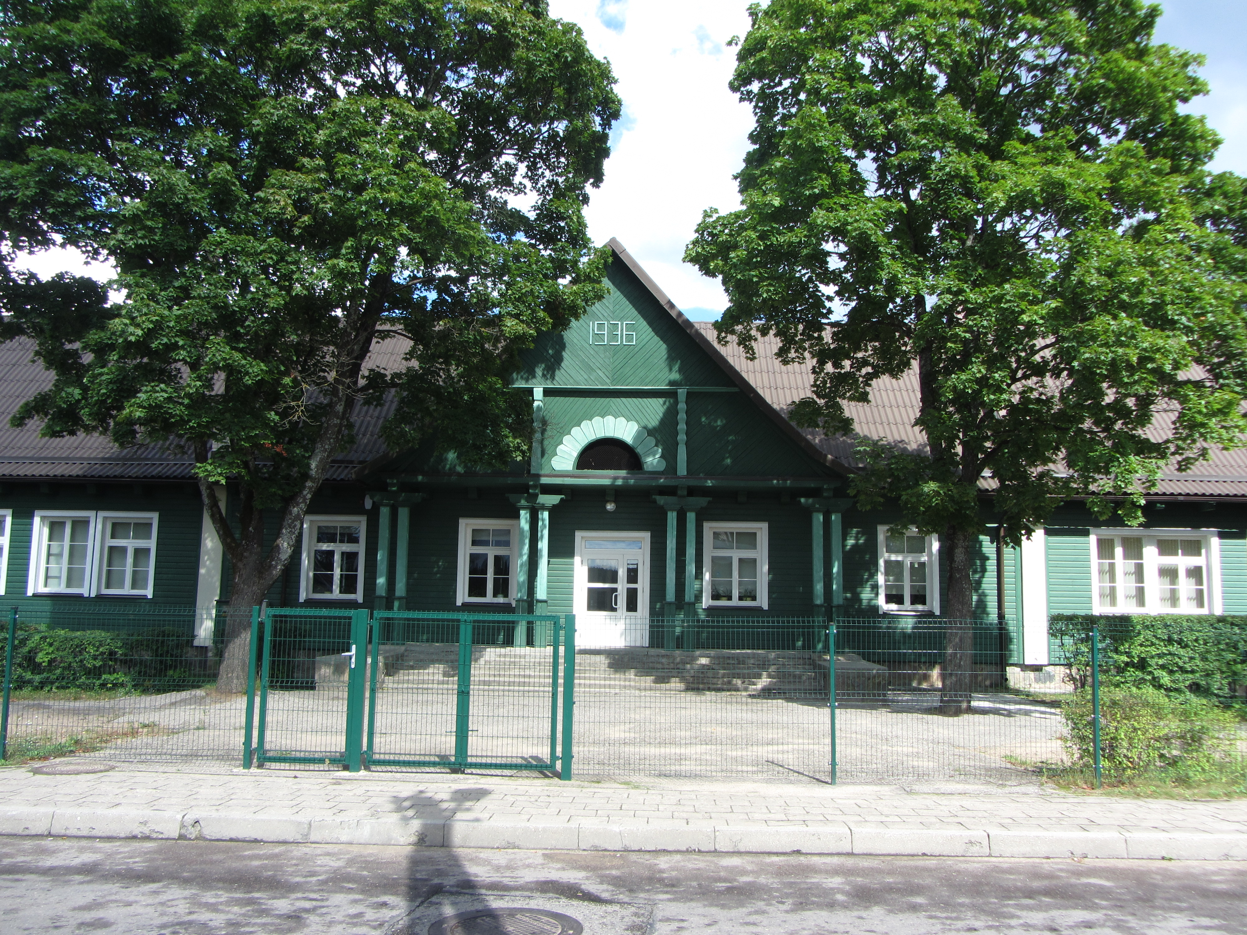 Nemenčinė, Lithuania